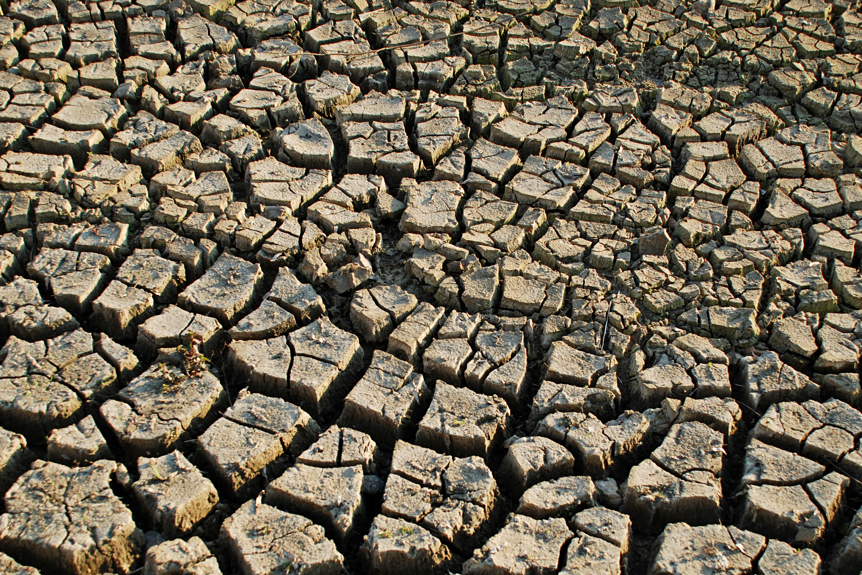 Belgique - Brabant wallon - Lac de Louvain-la-Neuve - Assec 2019